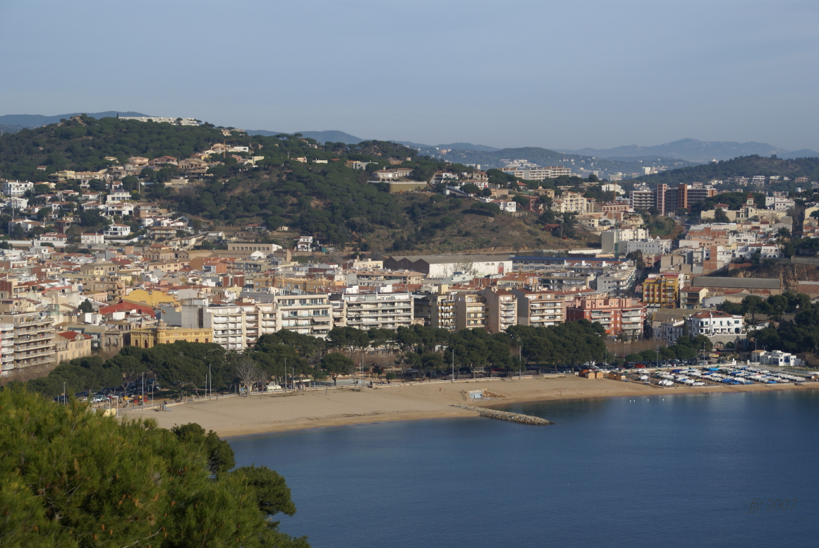 Panorama de ciutat de Sant Feliu de Guíxols vist des de Sant Elm